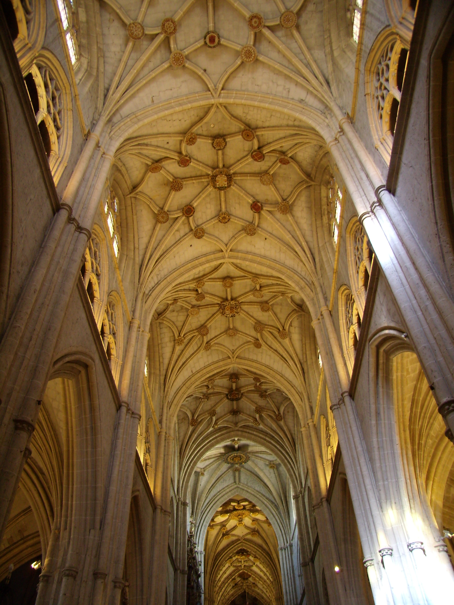 Bóvedas de la Catedral de Palencia